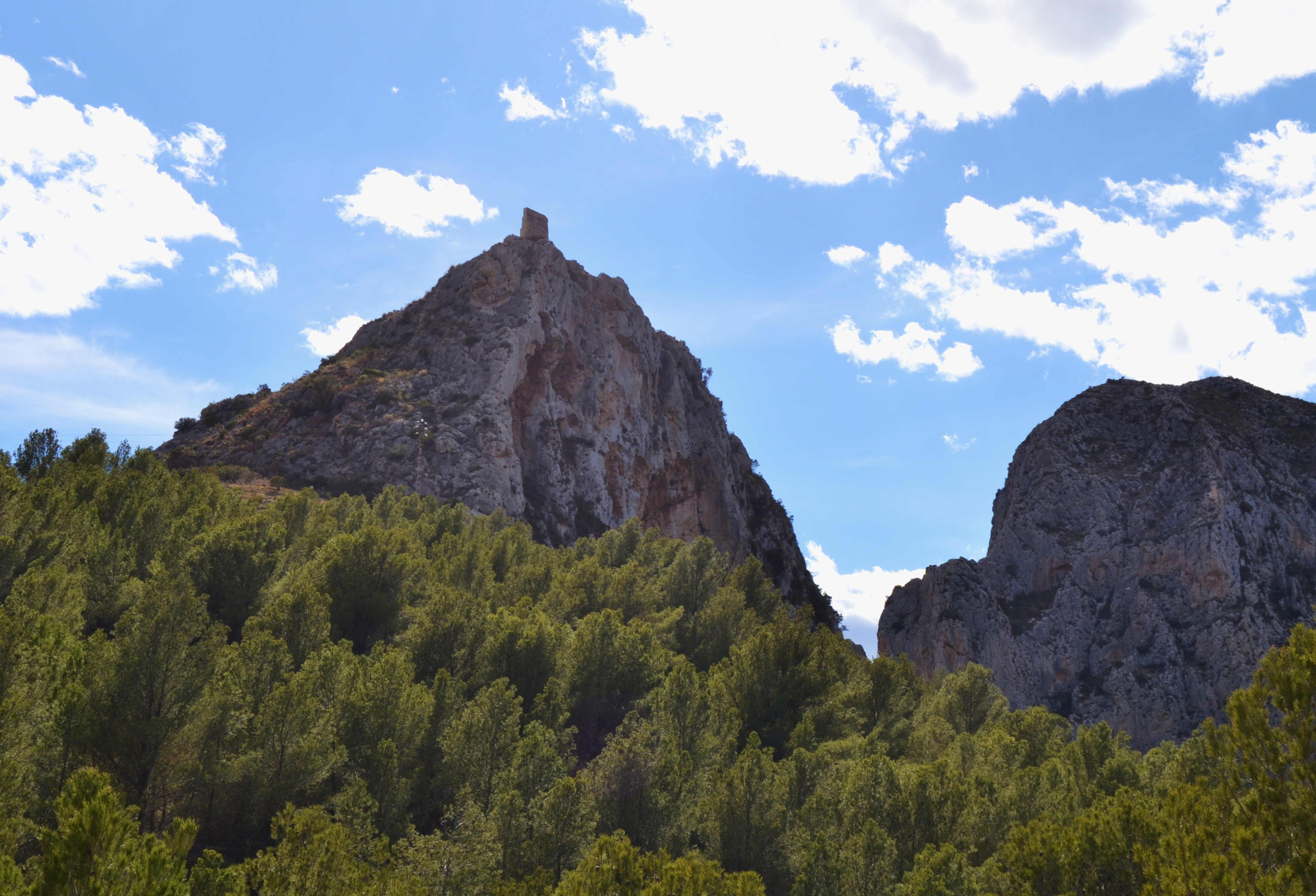 Pineda i castellet de Calp.